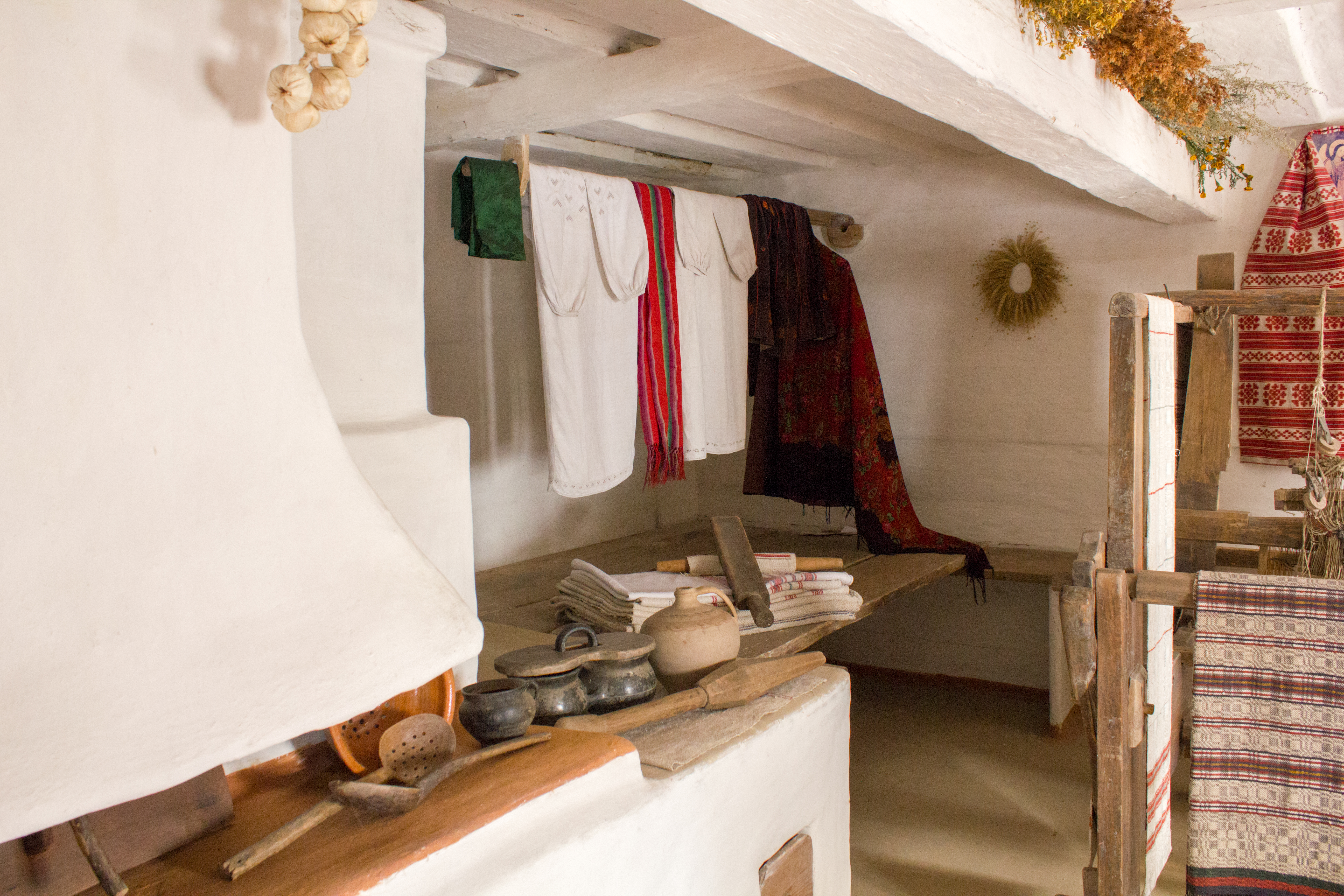 Хата з села Яснозір'я Черкаського району Черкаської області з садиби № 1., Київ, Пирогів